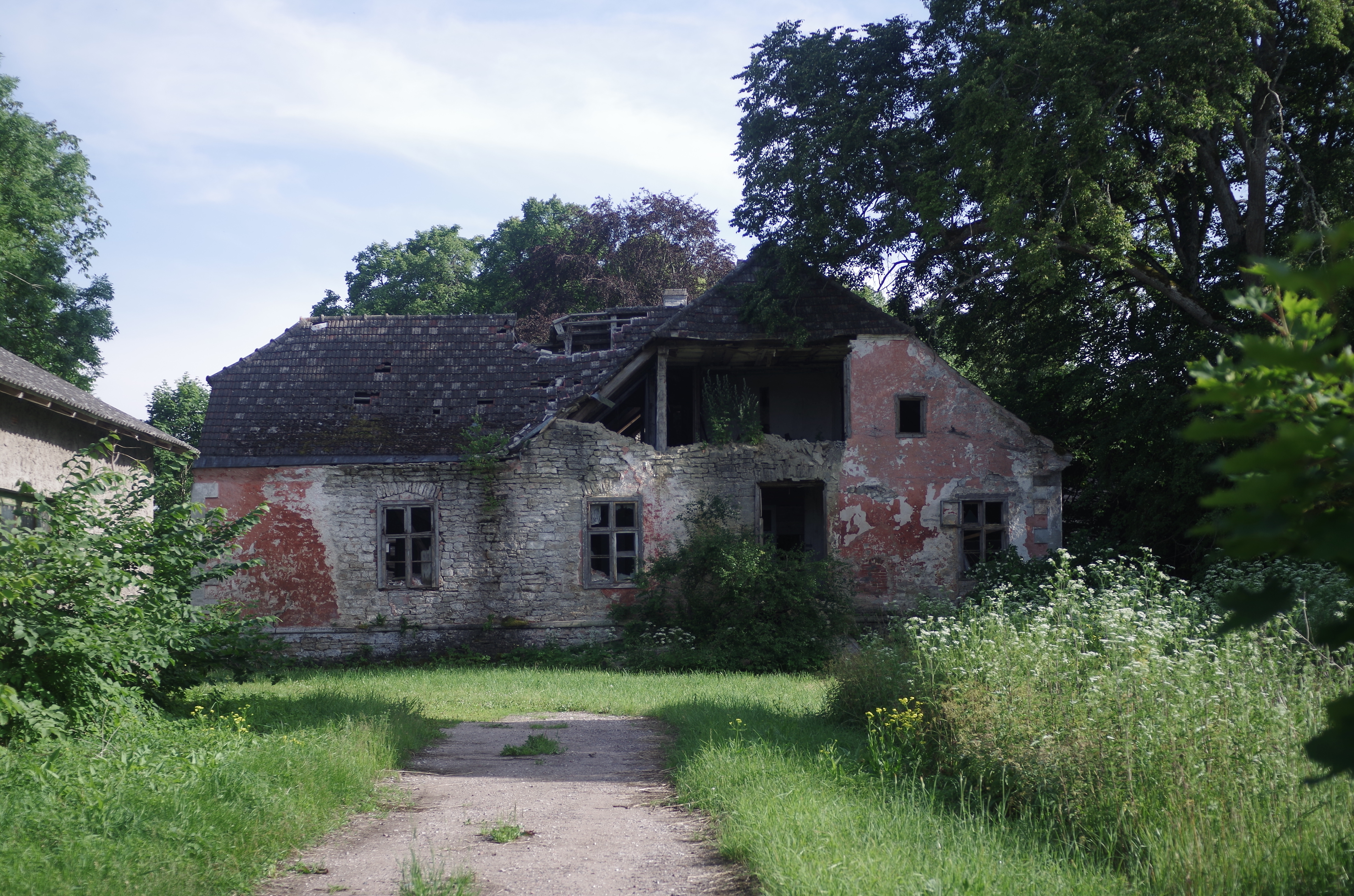 Pihtla mõis Saaremaal Pihtla vallas. (Foto: 2014)